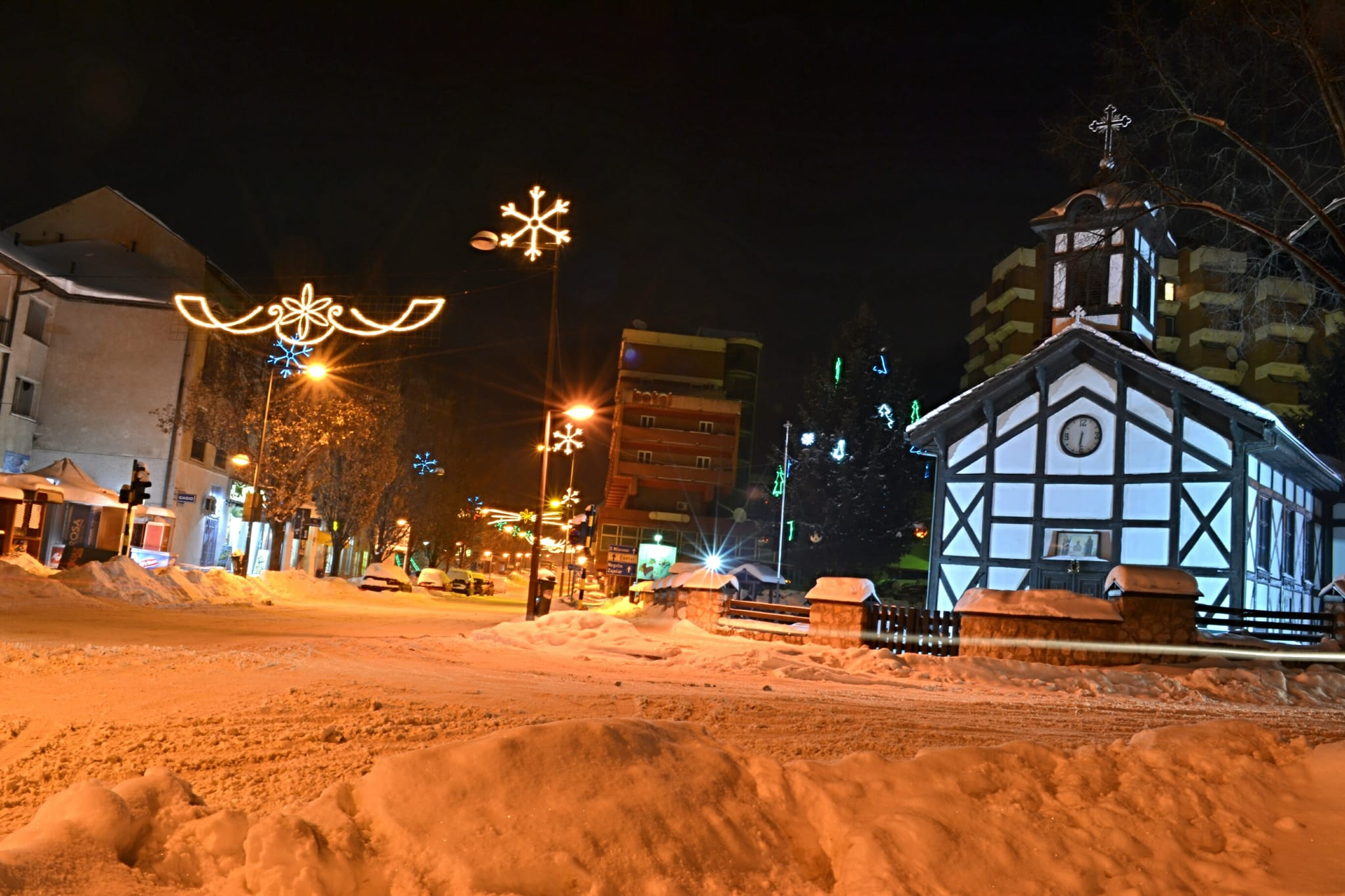 Crkva u Majdanpeku, pod snežnim pokrivačem